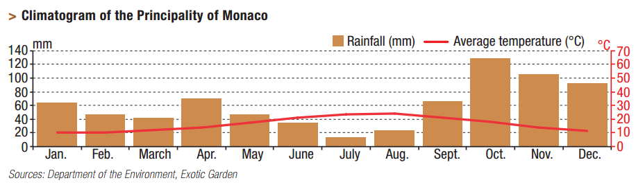 Количество осадков и средняя температура по месяцам (в среднем за 1981-2010)